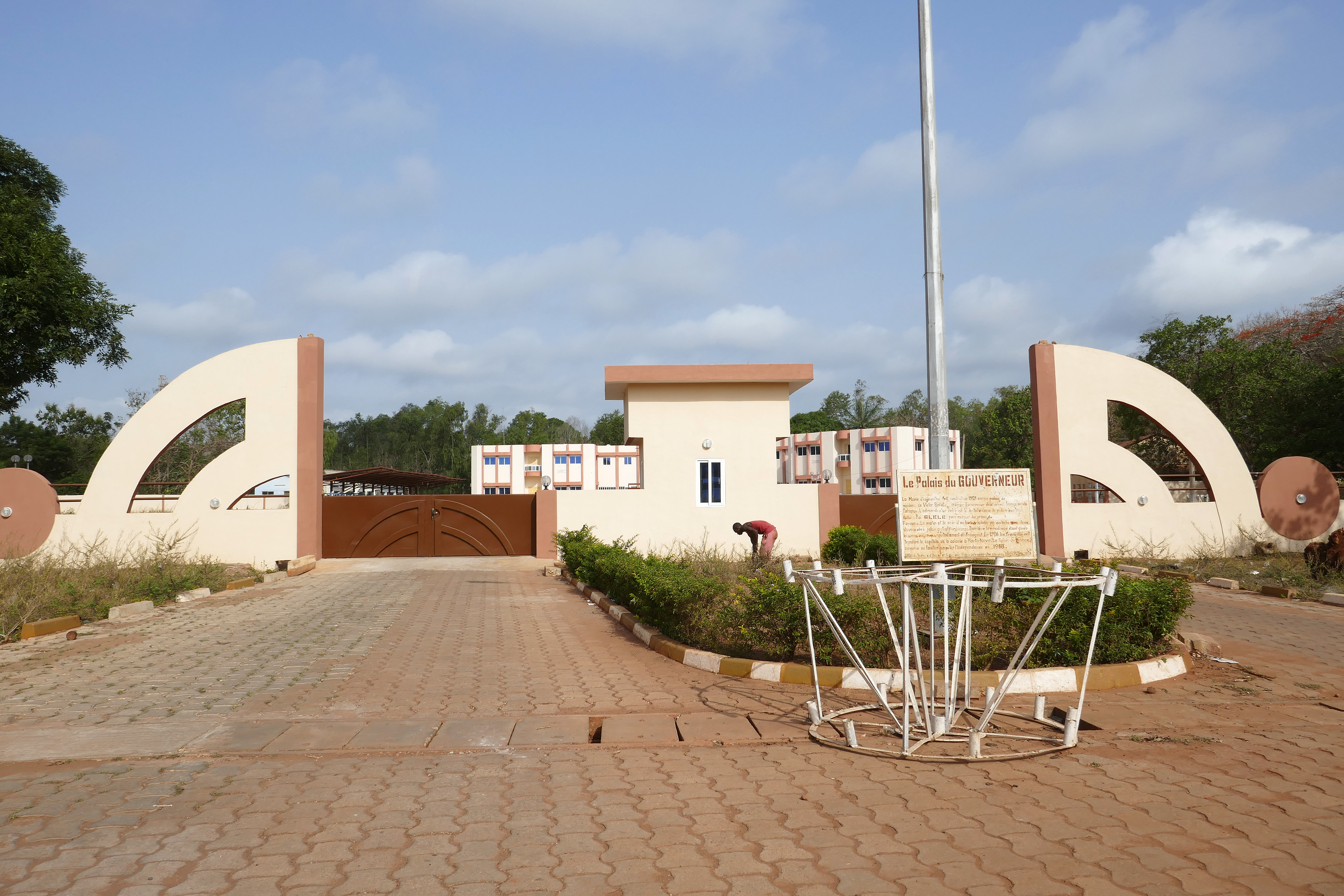 Ancien palais du Gouverneur à Abomey (Bénin). Aujourd'hui mairie d'Abomey.